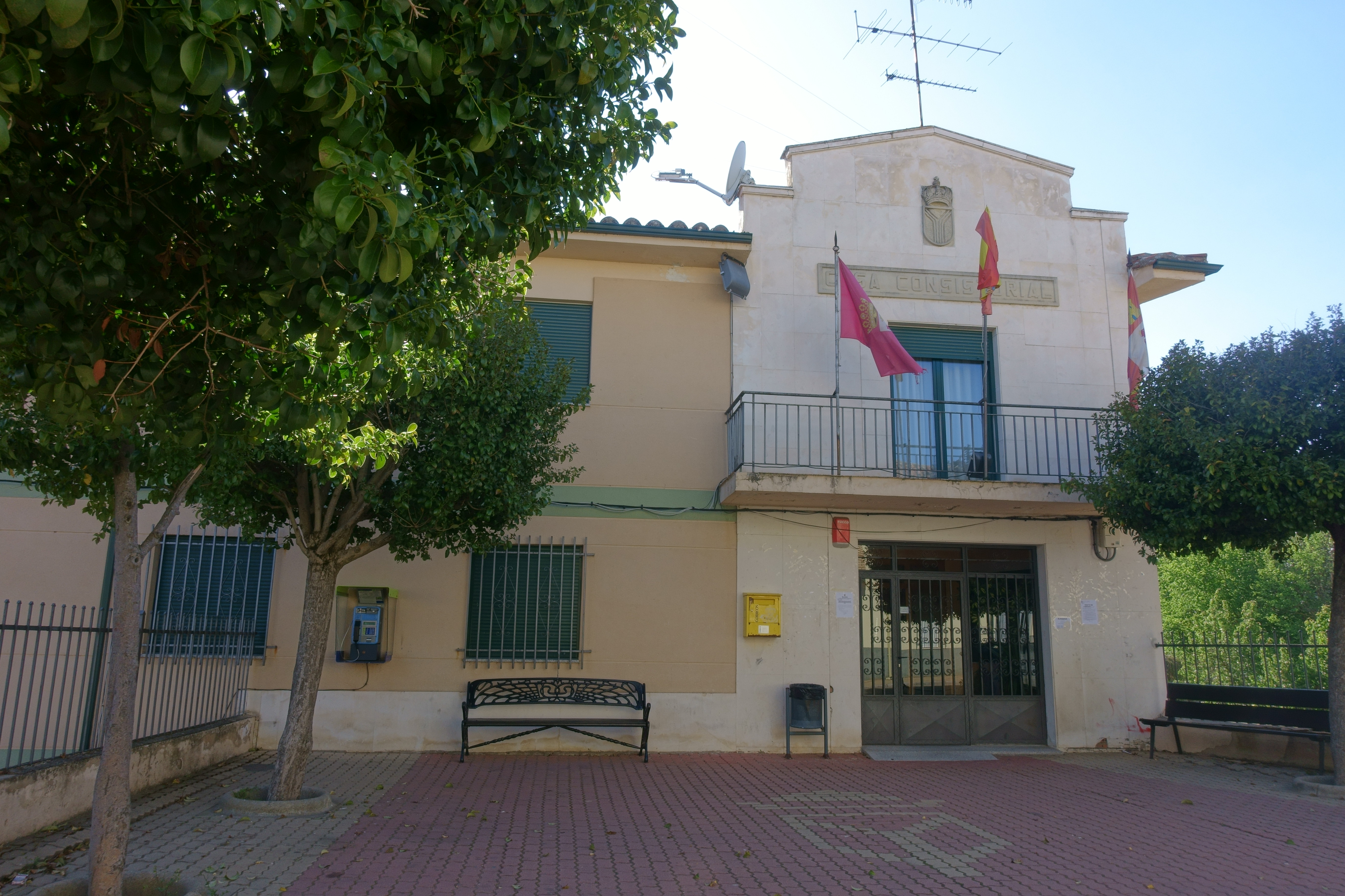 Casa consistorial de Cimanes del Tejar (León, España).